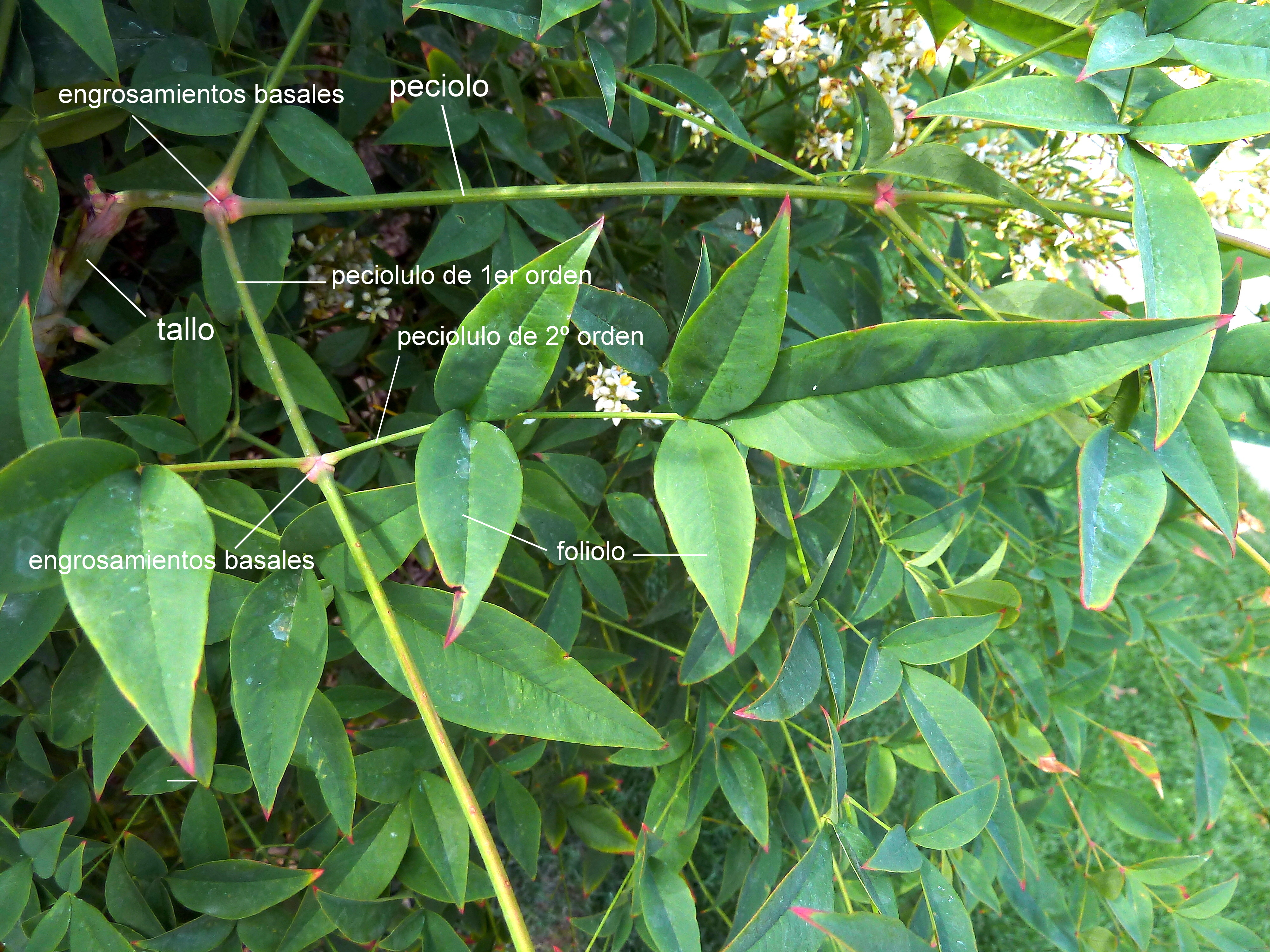 Nandina domestica ( Bambú sagrado) - Morfología de la hoja. -Cultivado/ornamental, Paseo de El Salvador, Parque del Buen Retiro, Madrid (España).